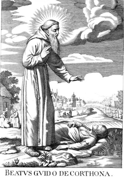 Guido da Cortona (1187-1247), uno dei primi discepoli di san Francesco, fu sepolto nella cattedrale della città. La stampa descrive alcuni miracoli e il corteo funebre che sta per varcare la cinta muraria.